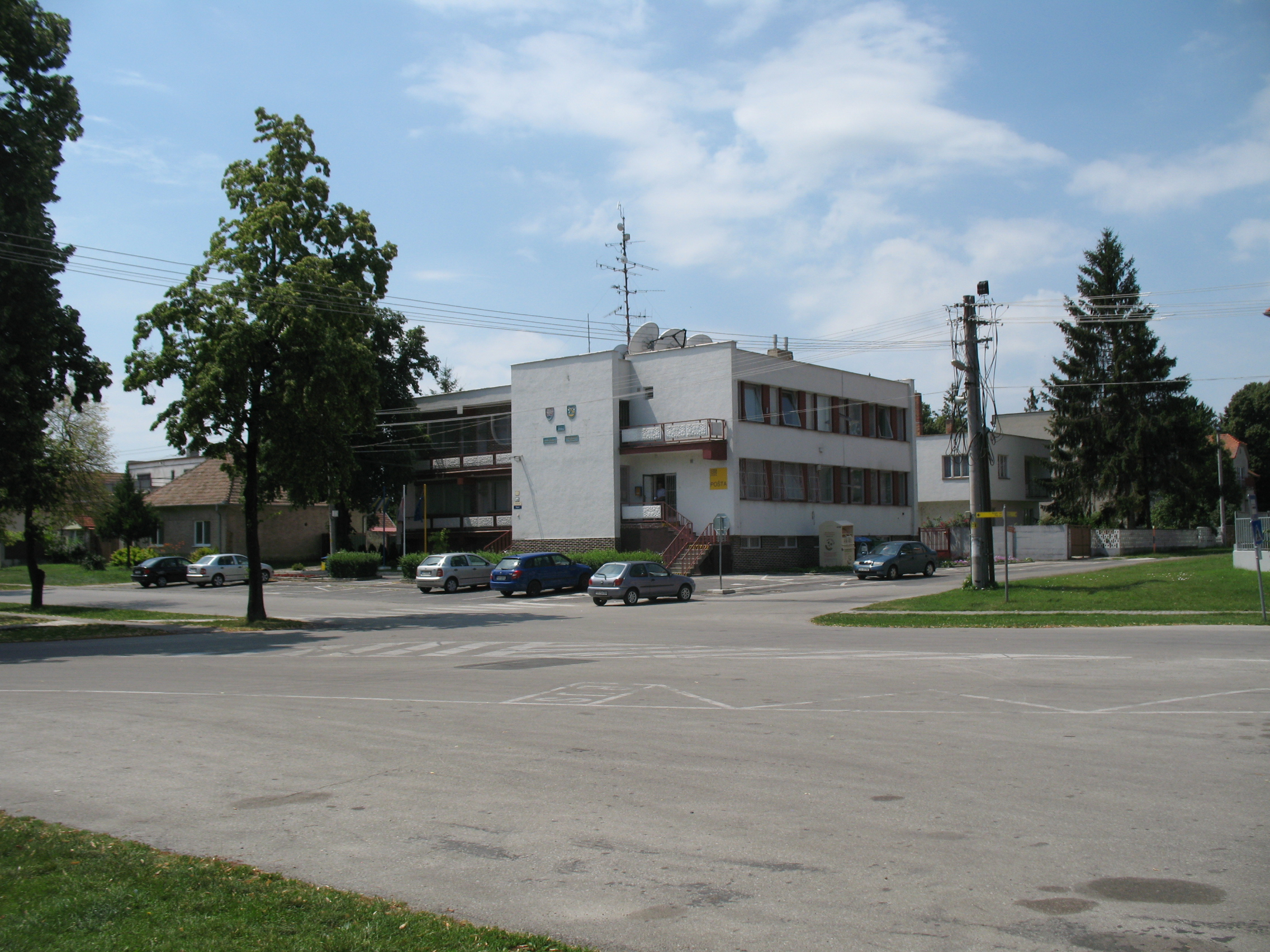 Vásárút